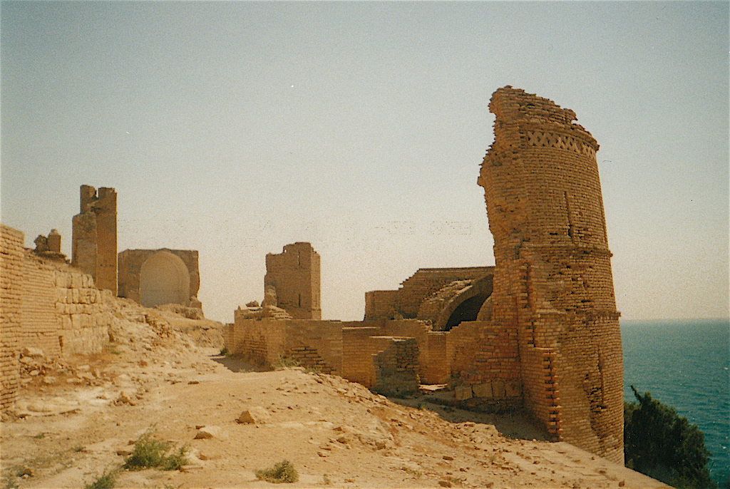 Qal'at Ja'bar, Syria